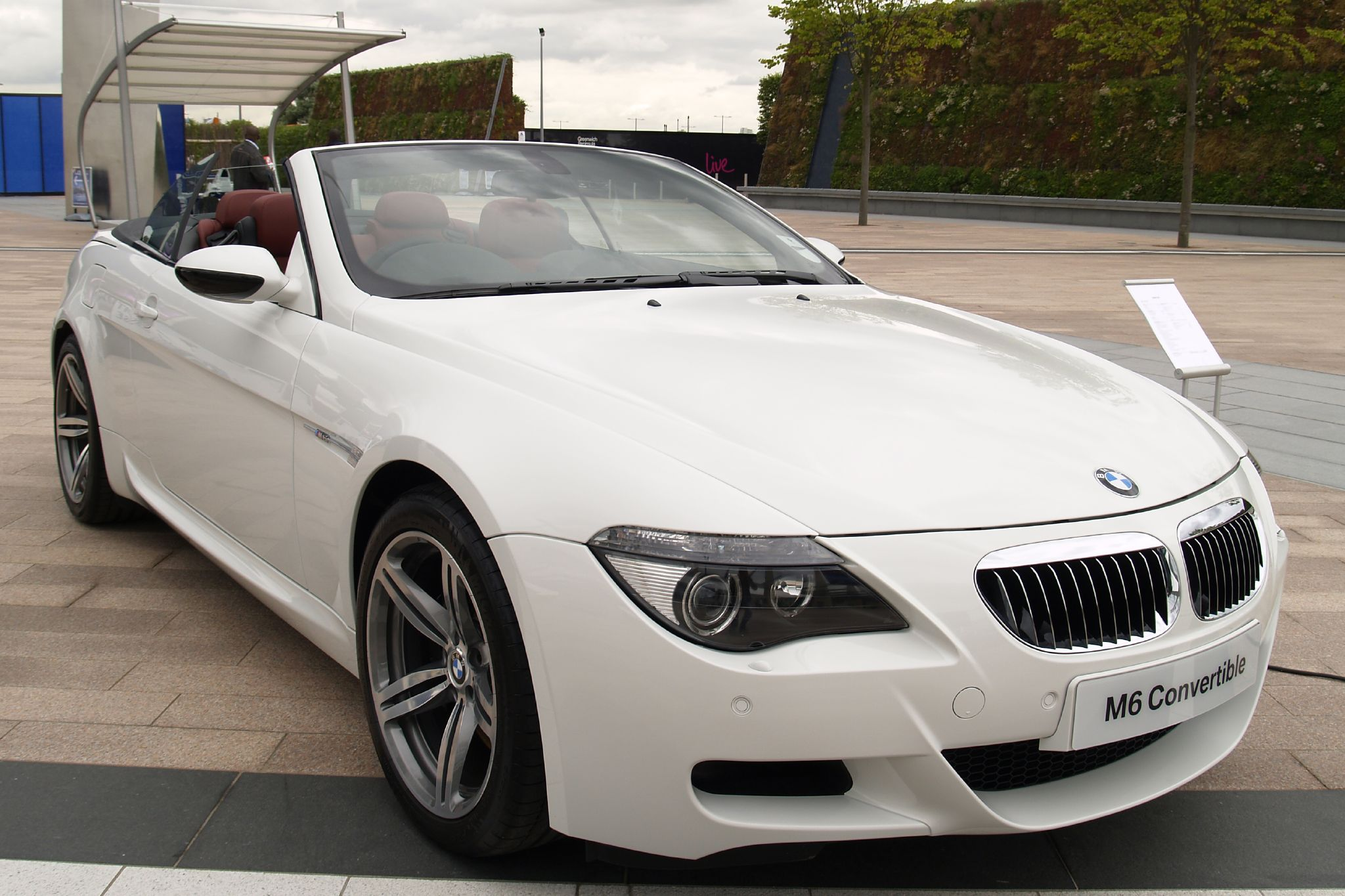 BMW POWER JULY 07 Peninsula Square O2